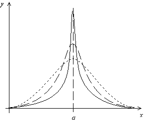 fonction de Dirac : limite d'une suite de fonctions cloches de surface 1 et de largeur tendant vers 0 Auteur : Christophe Dang Ngoc Chan, réalisé avec un programme de dessin vectoriel Licence GFDL Christophe Dang Ngoc Chan